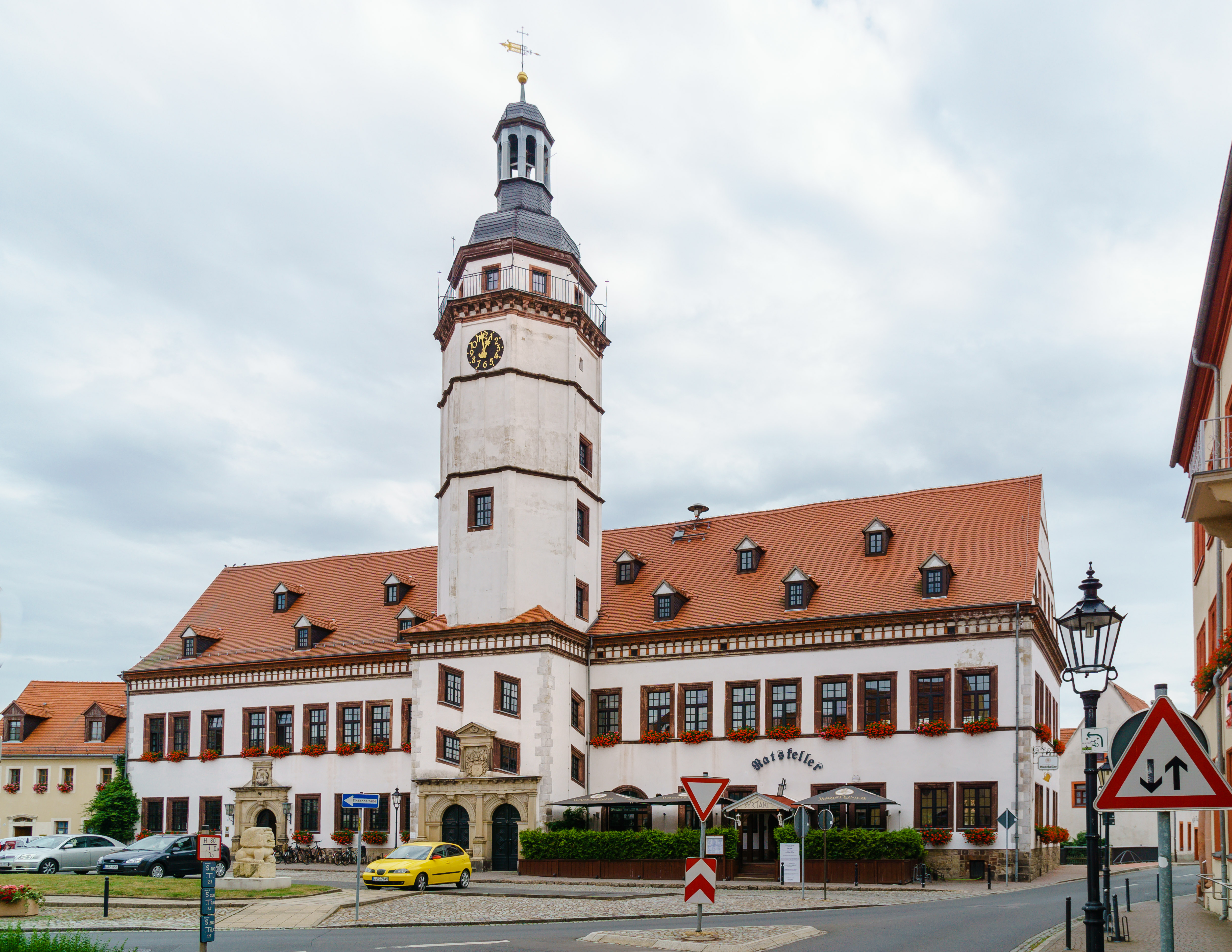 Rathaus, Markt 1 in Pegau